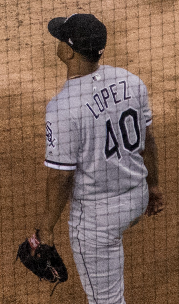 Reynaldo López